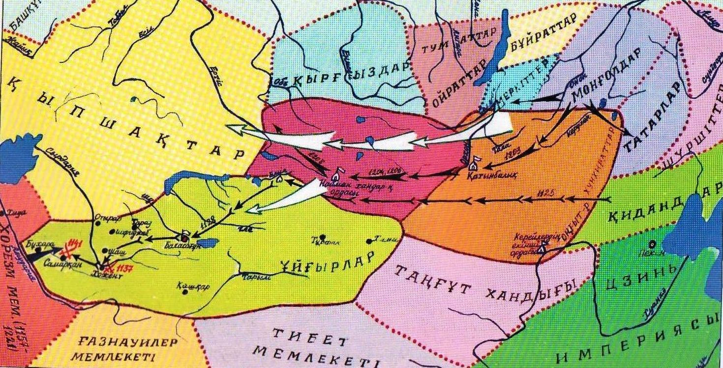 Карта Найманского государства и сопредельных стран